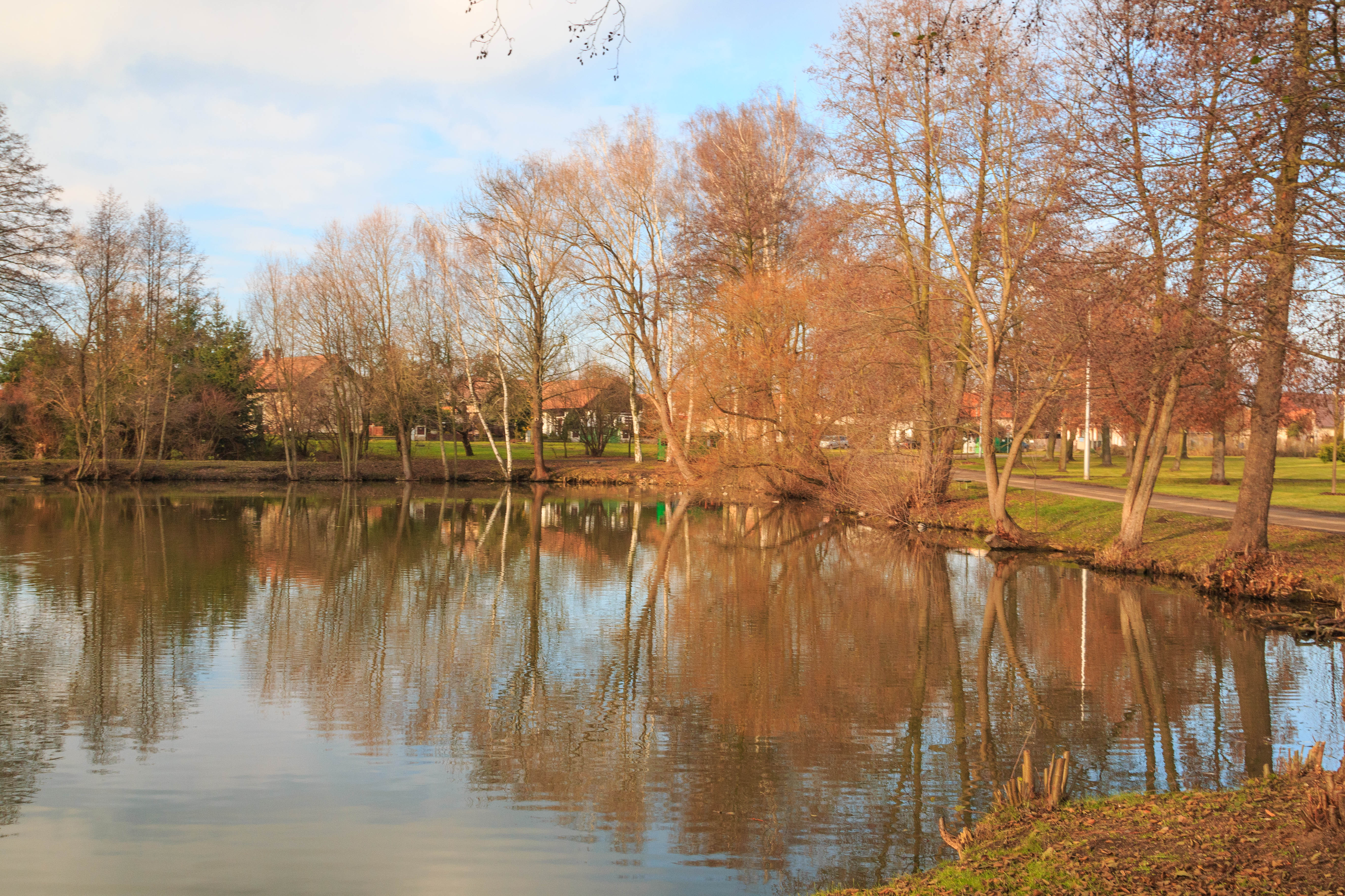 Živanický návesní rybník Project: Vodstvo.